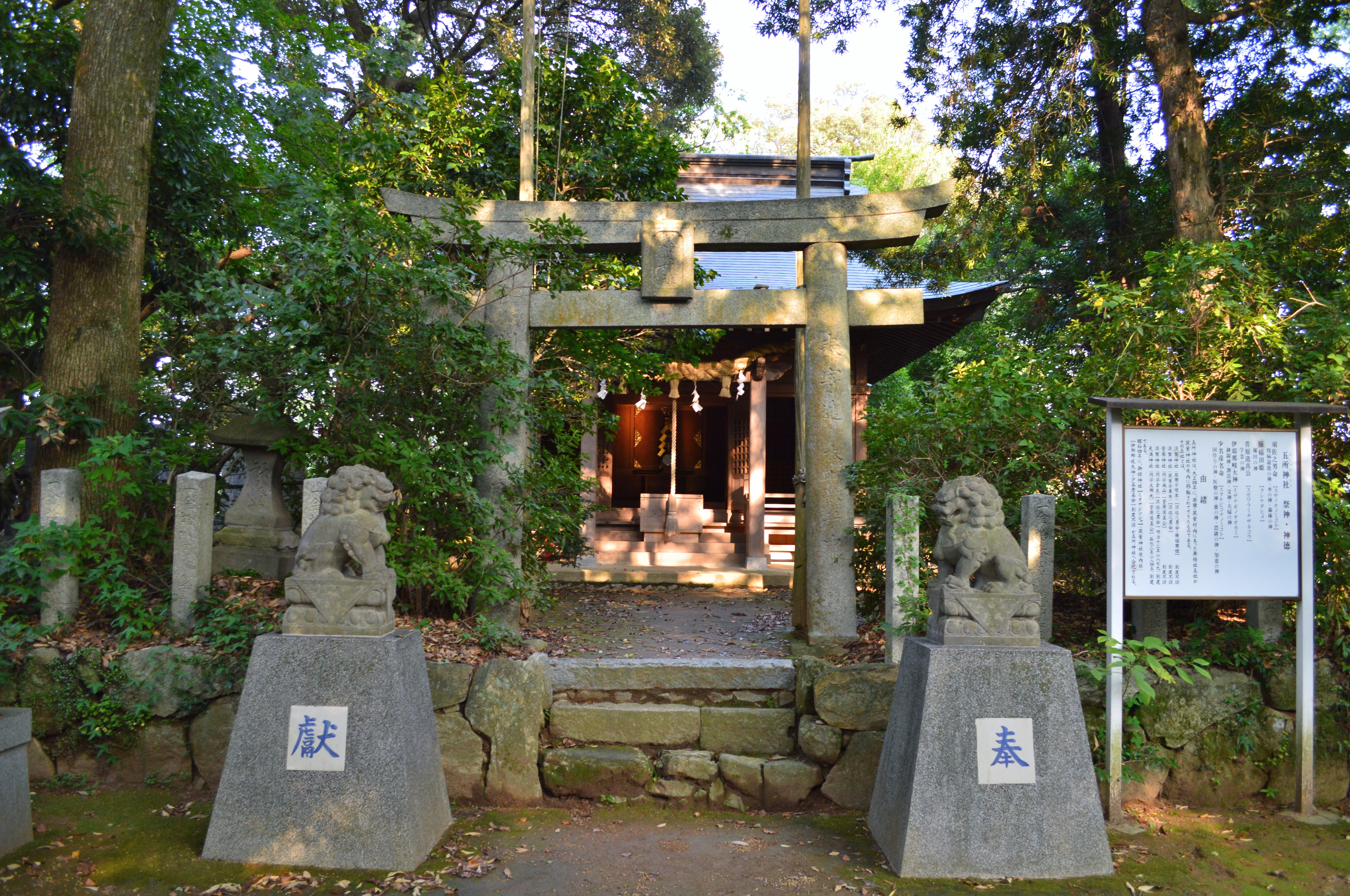 五所神社 (筑紫神社境内社)